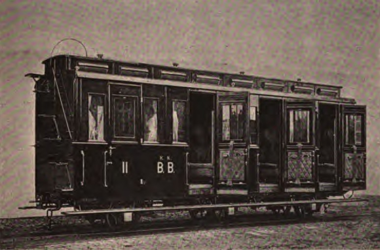 Dreiachsiger 8.00 Meter langer Erst-Zweitklasswagen der Bosnabahn